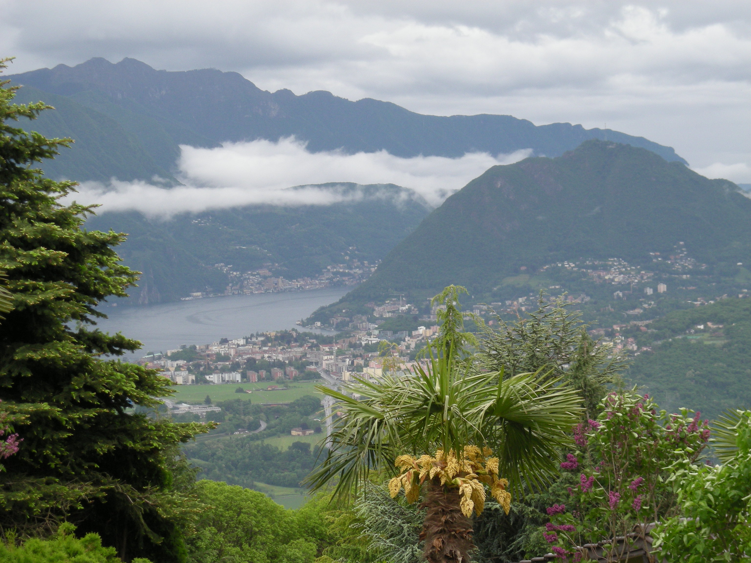 Arosio (Malcantone), Panoramablick auf Lugano